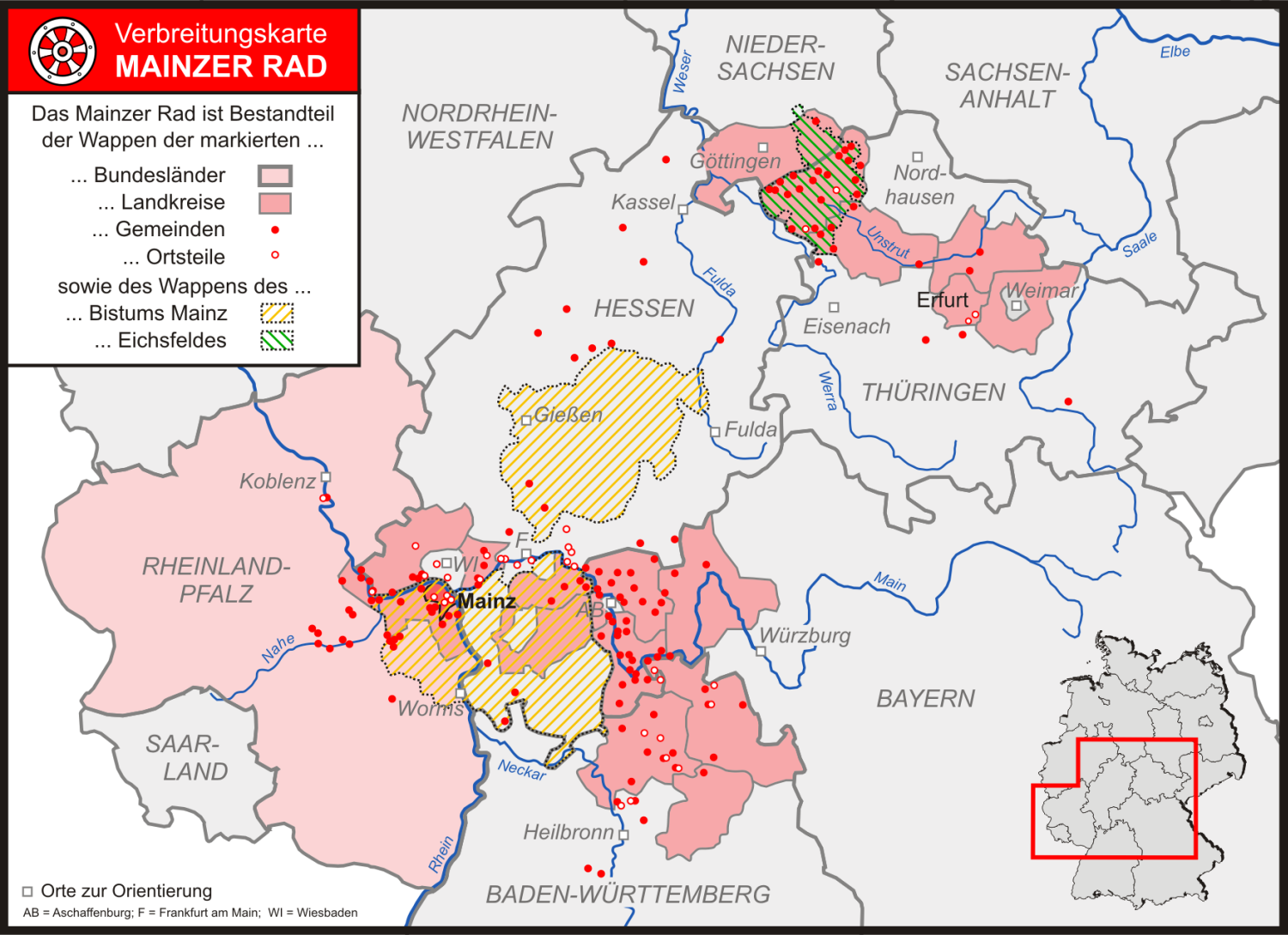 Bundesländer, Landkreise, Städte/Gemeinden und Stadtteile/Ortsteile mit dem Mainzer Rad im Wappen